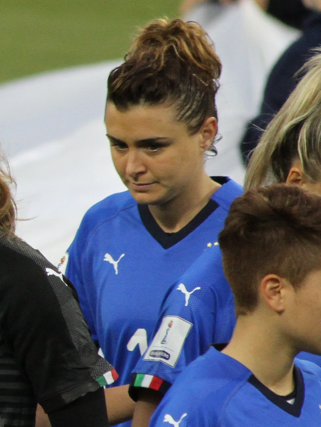 Ferrara, 10 aprile 2018: Italia vs Belgio, qualificazioni al Mondiale di Francia 2019